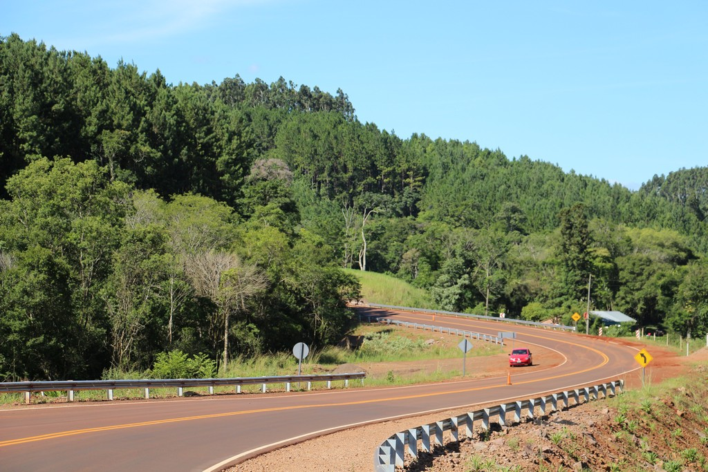 Ruta Provincial Nº 8, tramo Campo Grande- 25 de Mayo.